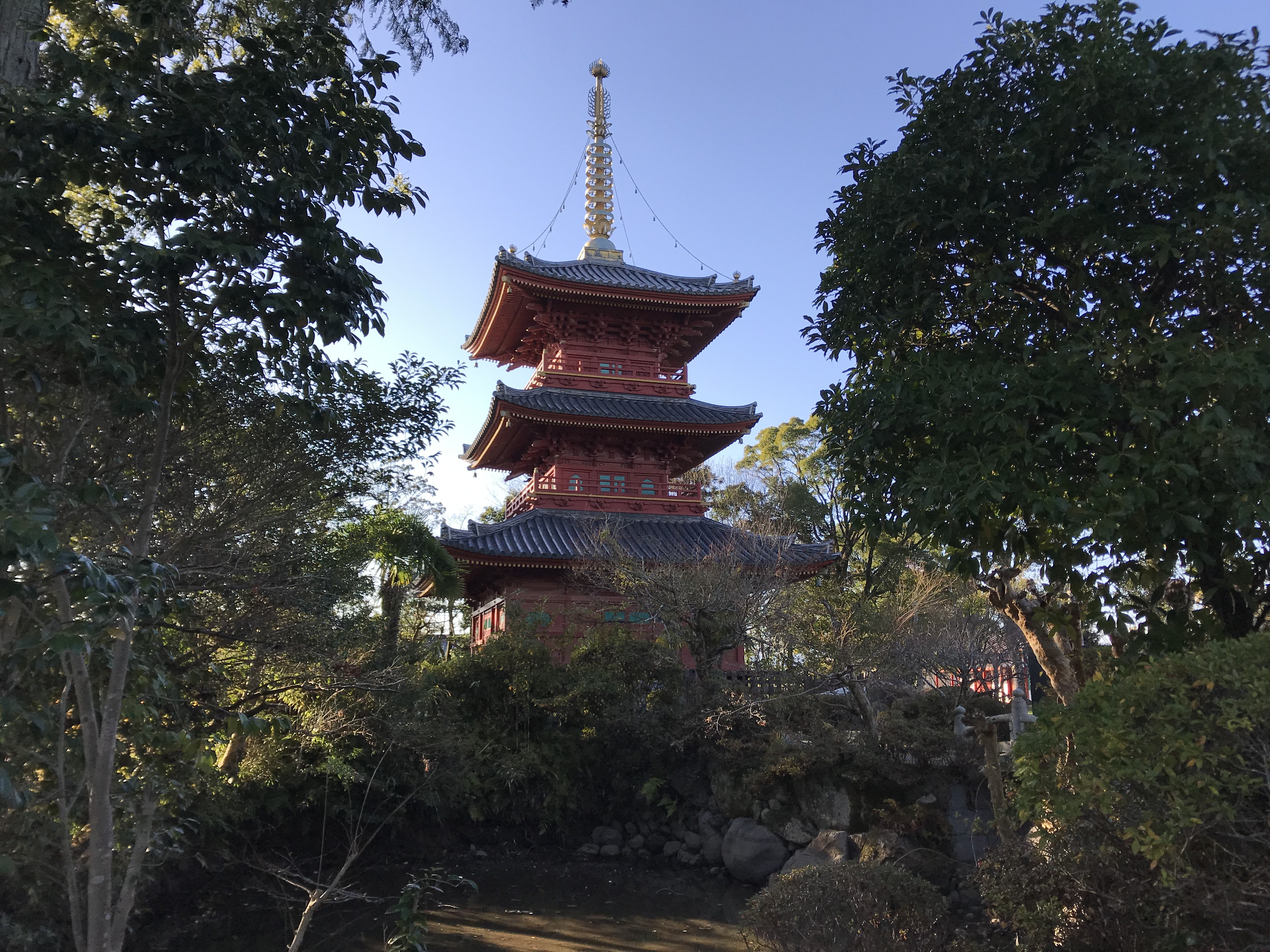 豊前国分寺・三重塔と池